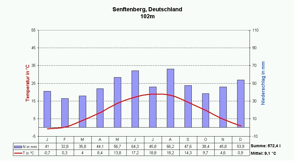 Klima in Senftenberg; Niederschläge und Temperaturen; für die Temperaturen wurden die Daten der Meßstation Schwarze Pumpe gewählt